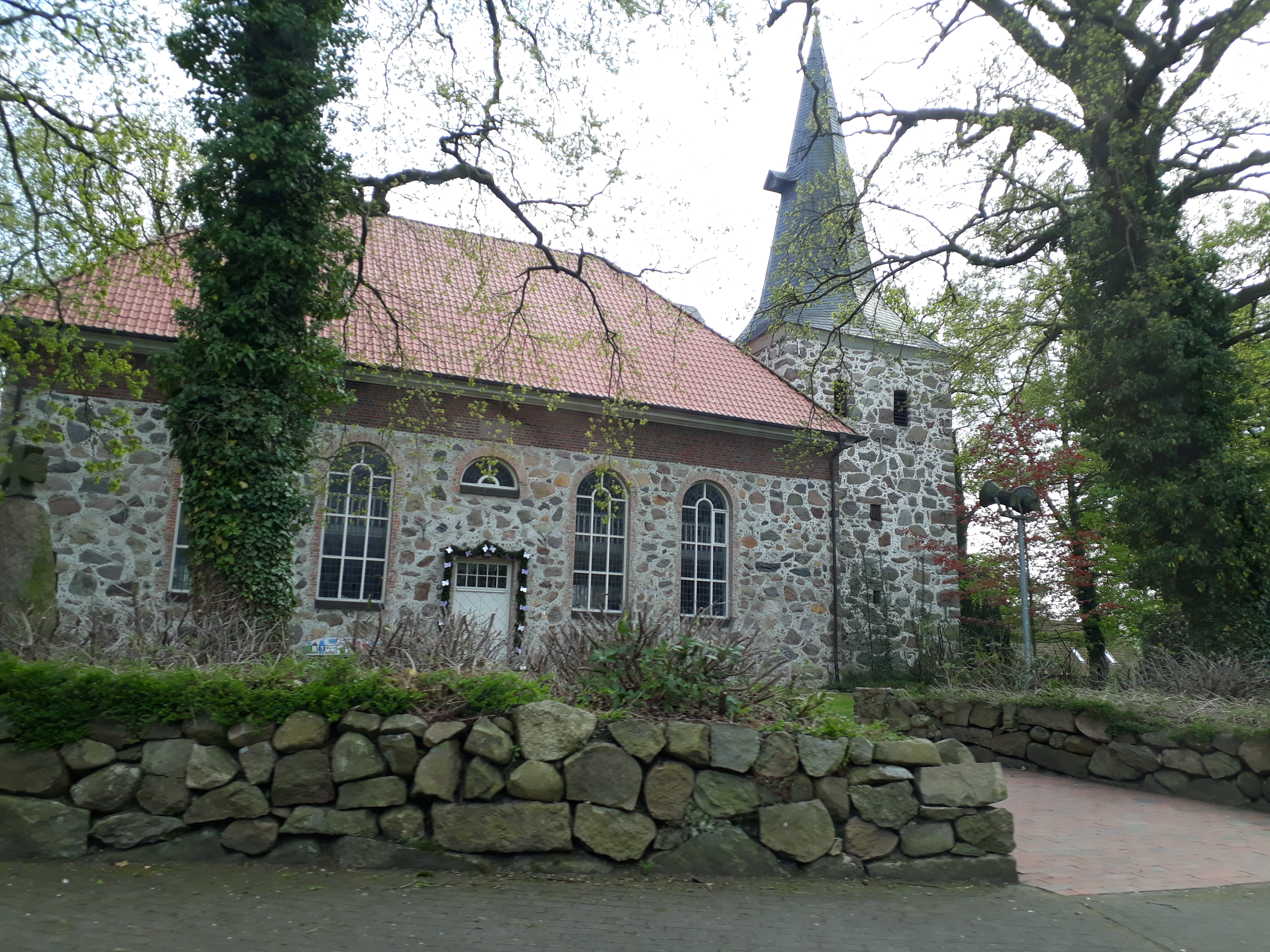 St.-Petri-Kirche in Mulsum, Gemeinde Kutenholz, Landkreis Stade in Niedersachsen.